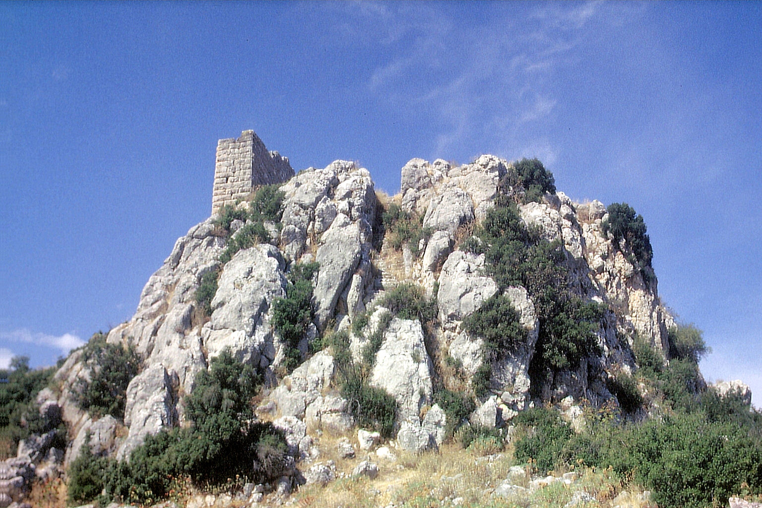 Akropolis von Orchomenos aus Ost